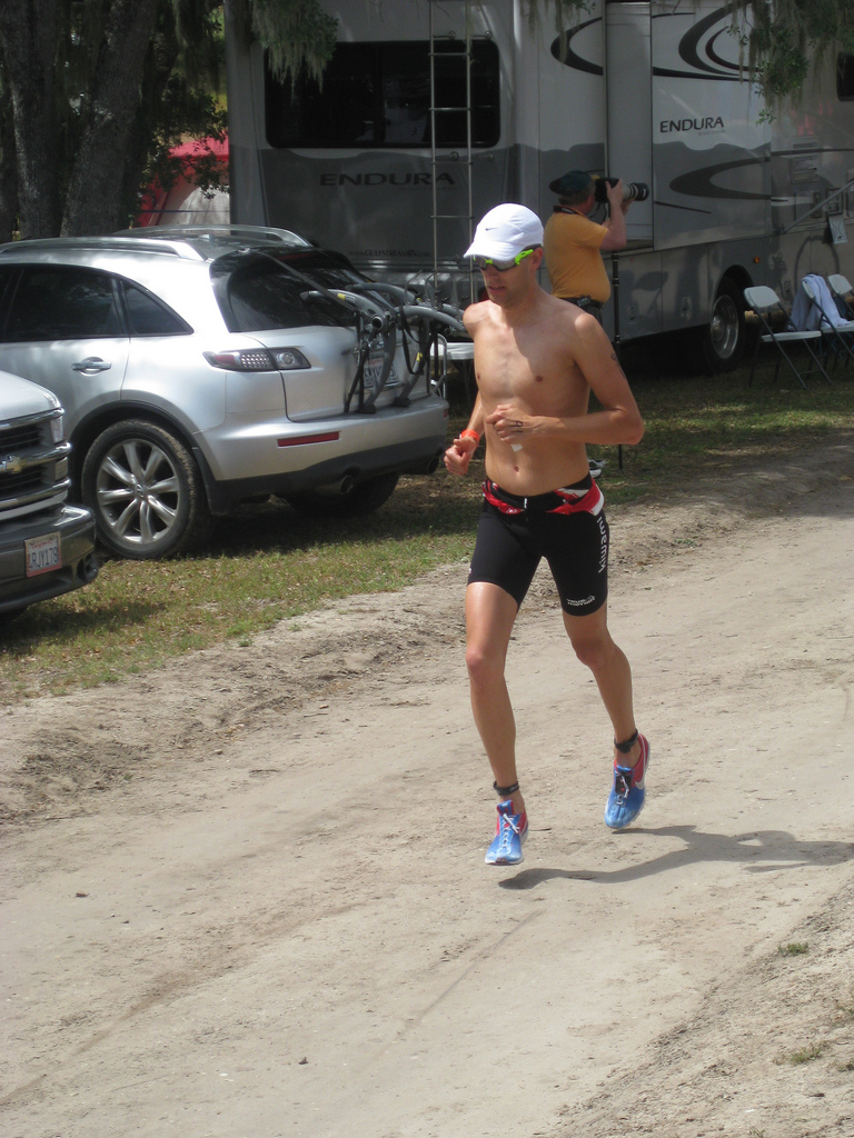 Windflower 2009